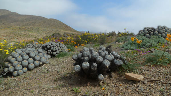 Cactos y flores en el parque nacional Llanos de Challe, Chile